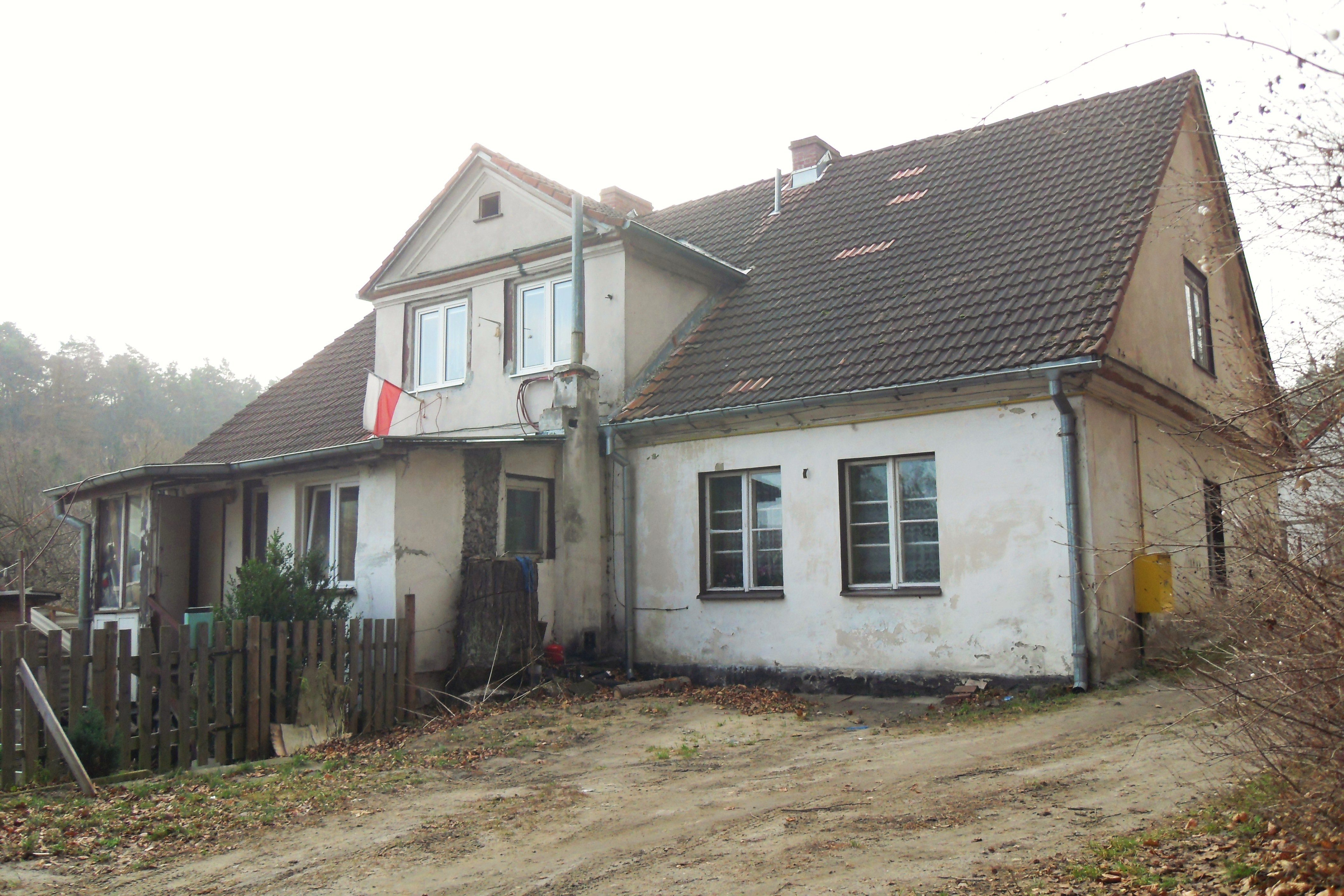 Gdańsk VII Dwór, ul. Abrahama 34. Budynek z kompleksu VI Dworu.